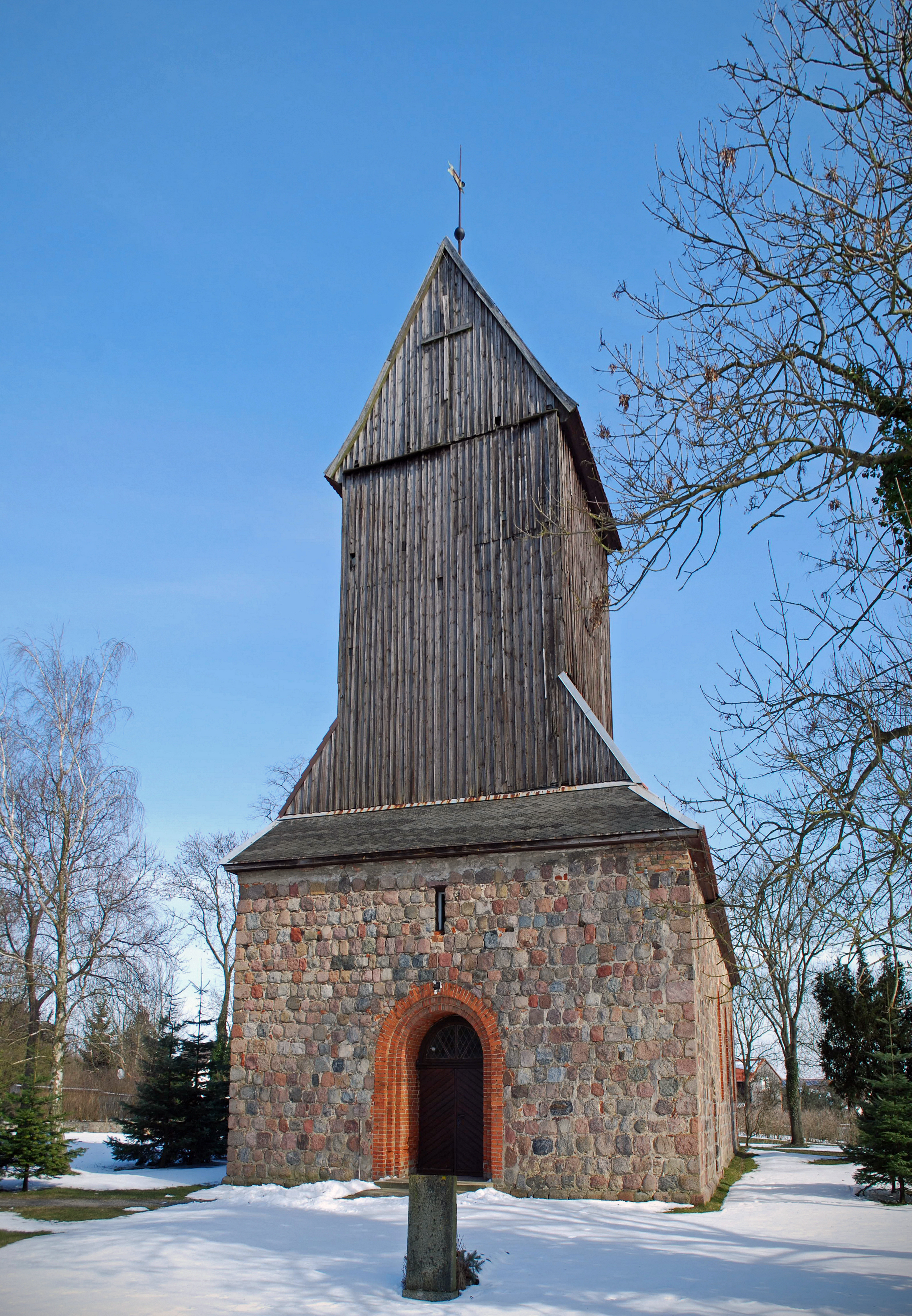 Gebäude und Denkmal in der Uckermark. (Altkreis Angermünde)